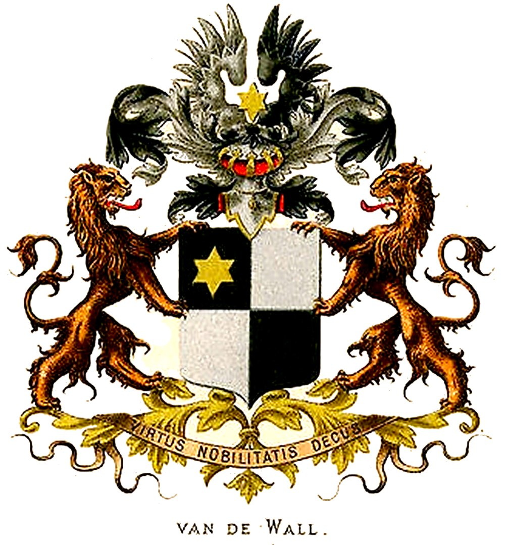 Wappen derer van de Wall, niederländische Linie derer von Dewall.